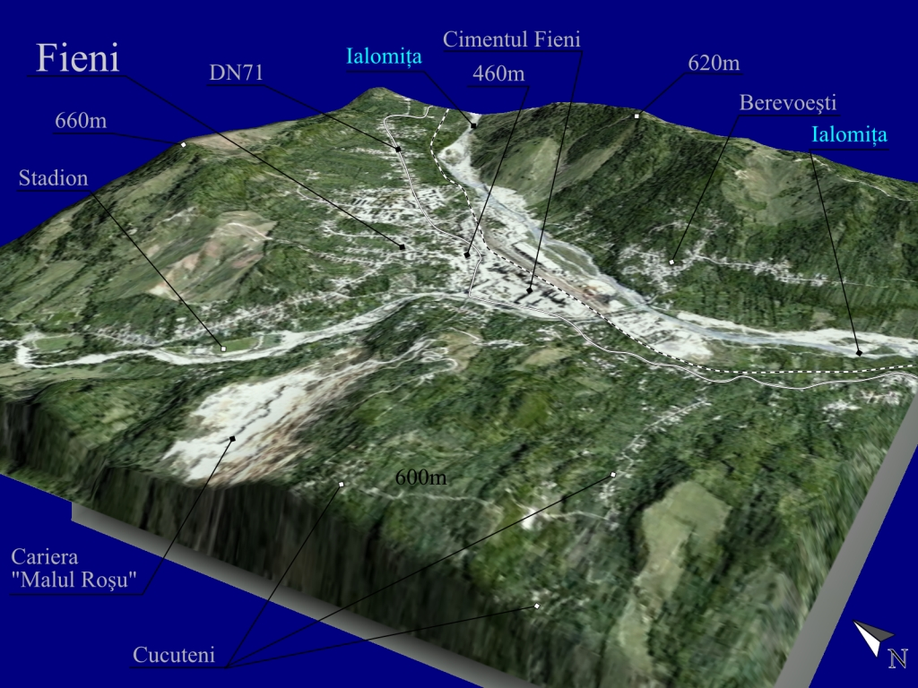 Prelucrare 3D pentru Fieni, Dambovita.